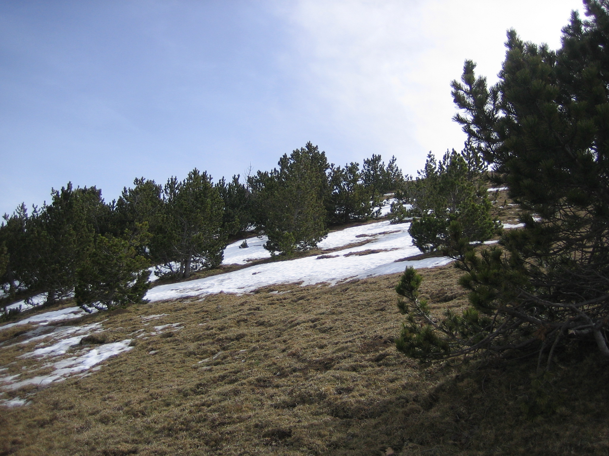 El Taga nevat.